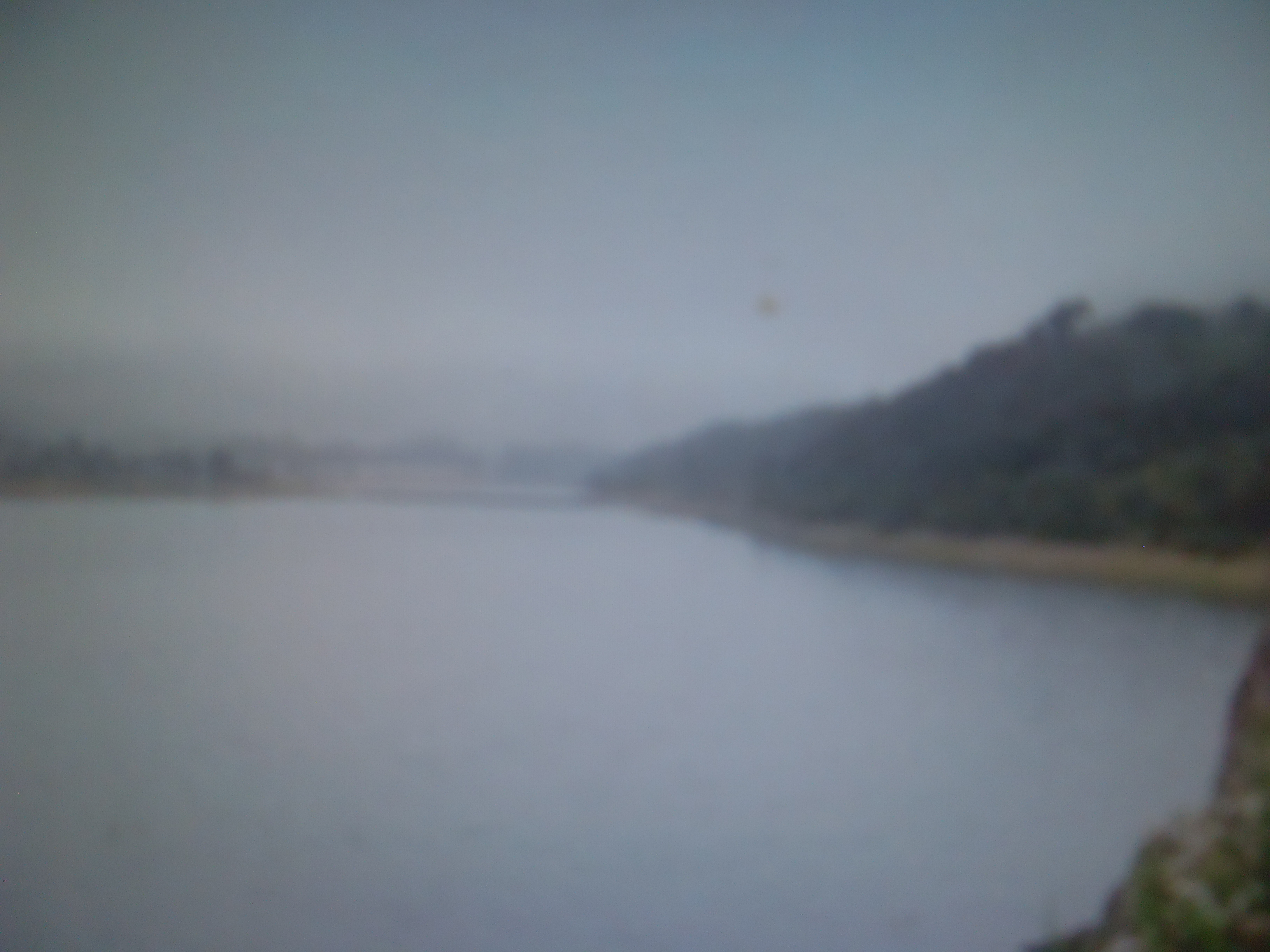 Presa de la Eztanzuela , en el Estado de hidalgo, méxico